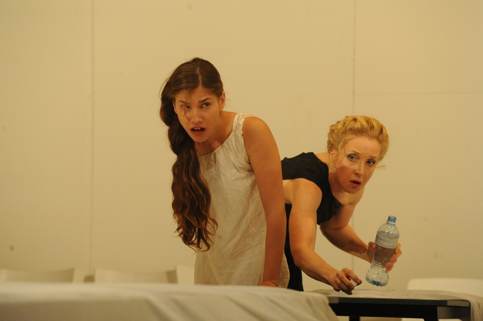 שירי גולן וגלוריה בס בהצגה "איפיגניה" מאת אוריפידס, בבימויו של גדי רול, בתיאטרון באר שבע, 2012